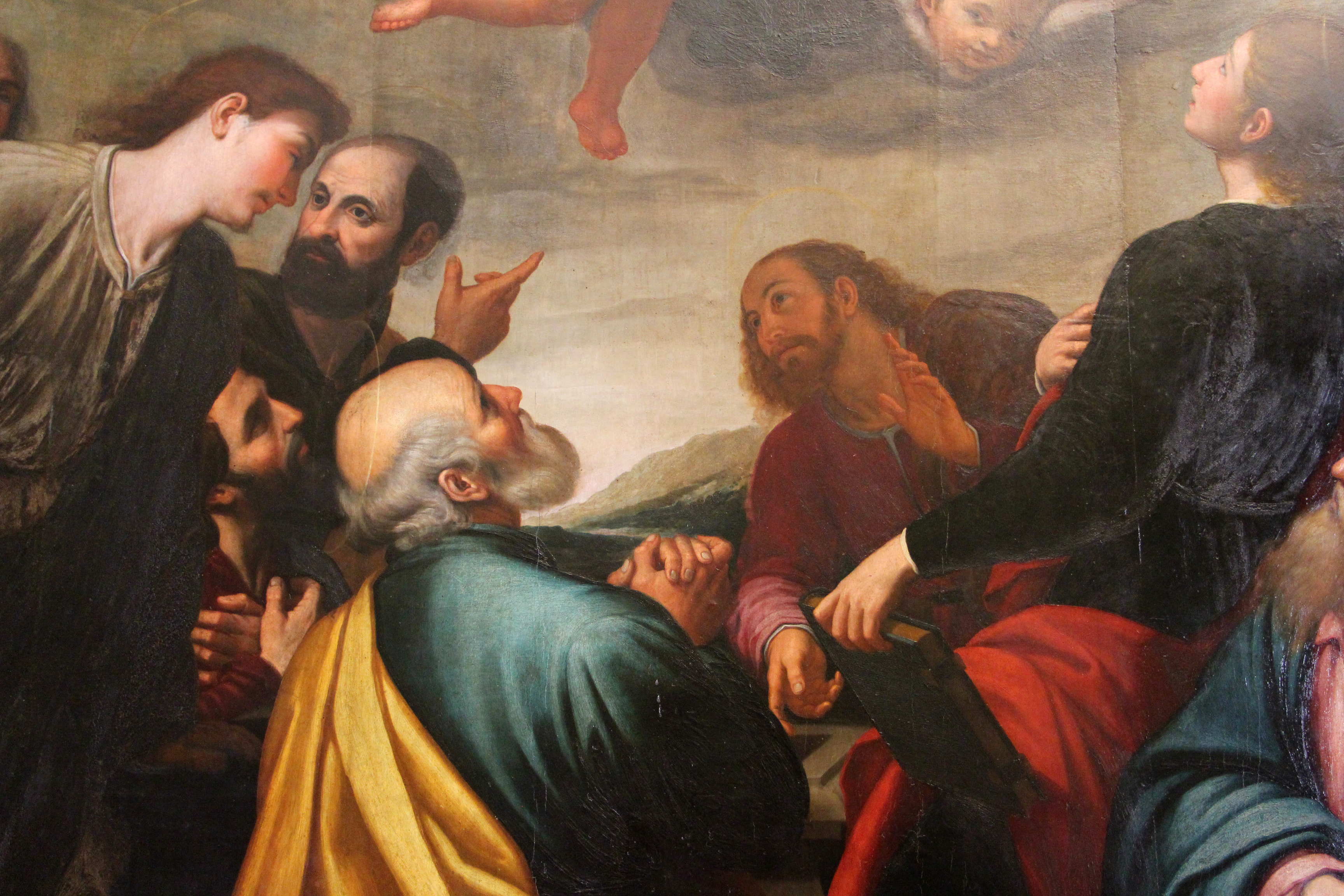 Cenacolo di Fuligno - MIBAC The making of this document was supported by Wikimedia CH. (Submit your project!) For all the files concerned, please see the category Supported by Wikimedia CH. This is a photo of a monument which is part of cultural heritage of Italy.